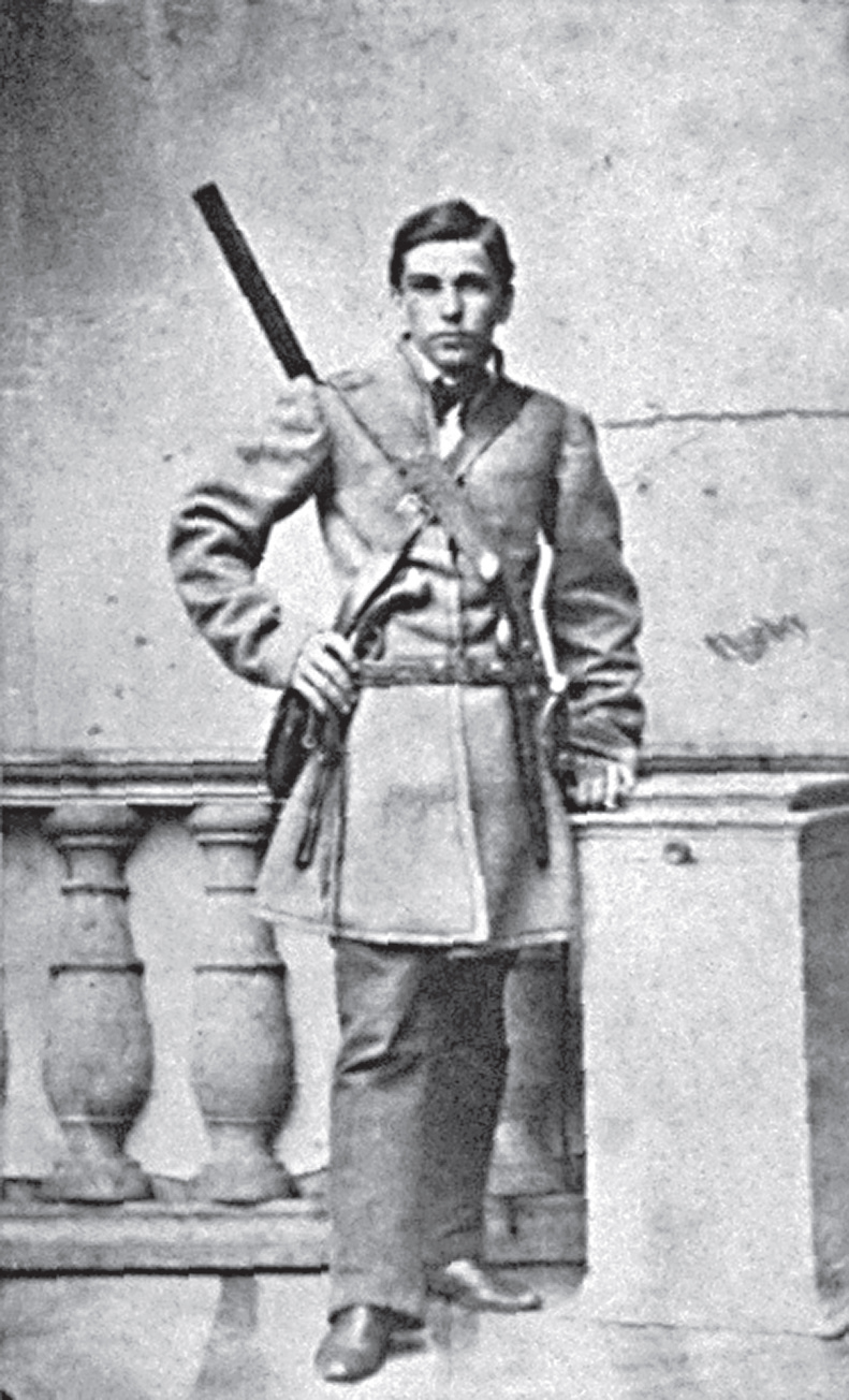 Беларуская (тарашкевіца): Партрэт Рамана Бохвіца (Raman Bochvic)